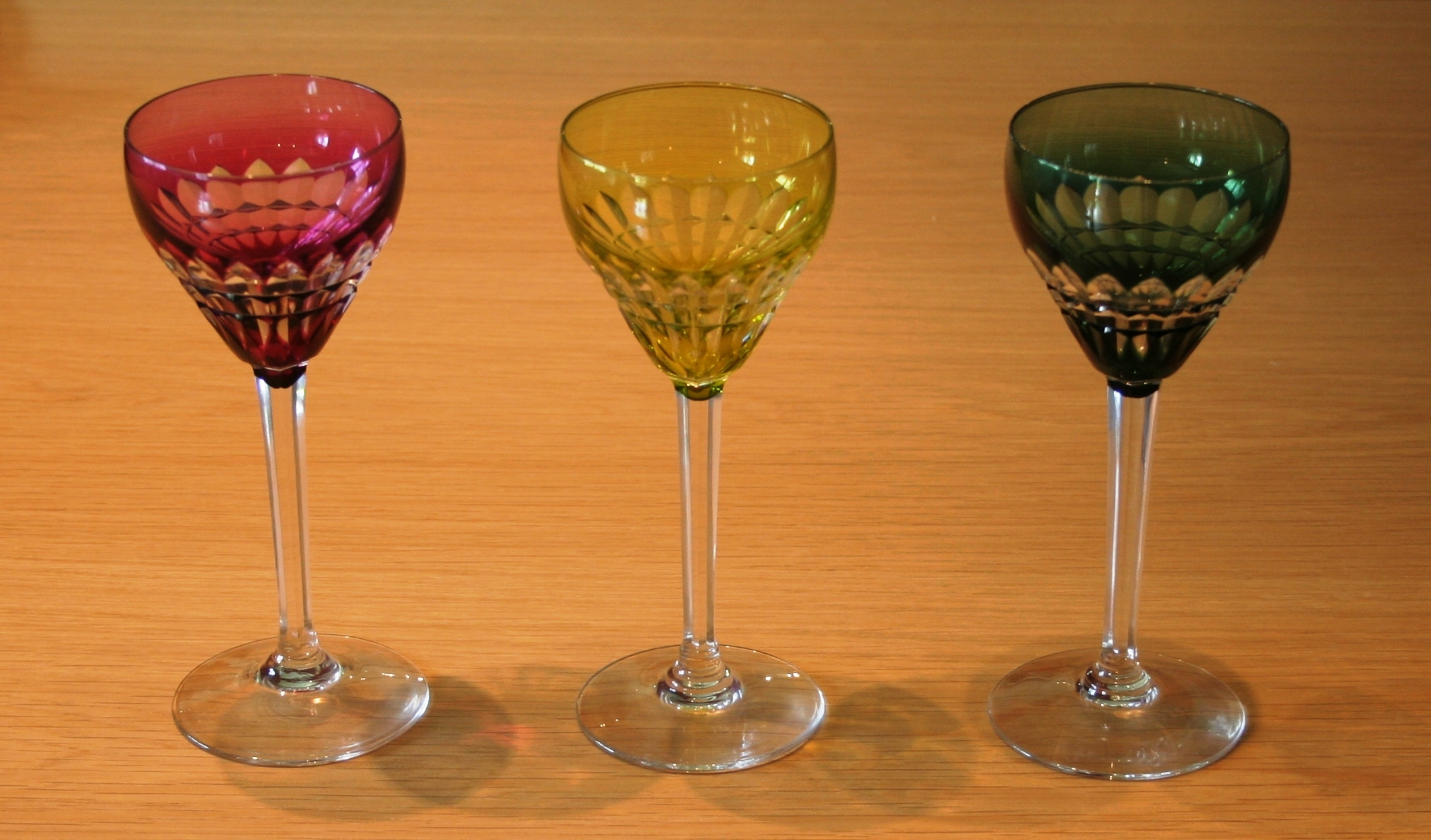 Dräi Réimer vu Val Saint Lambert.